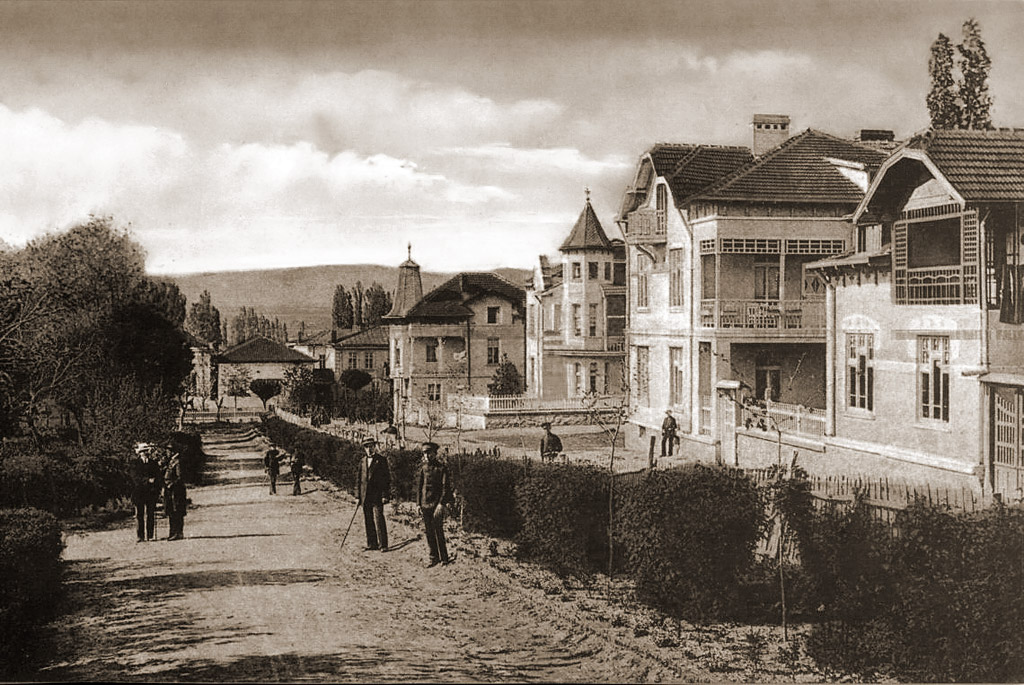 Кюстендил 1908 г.